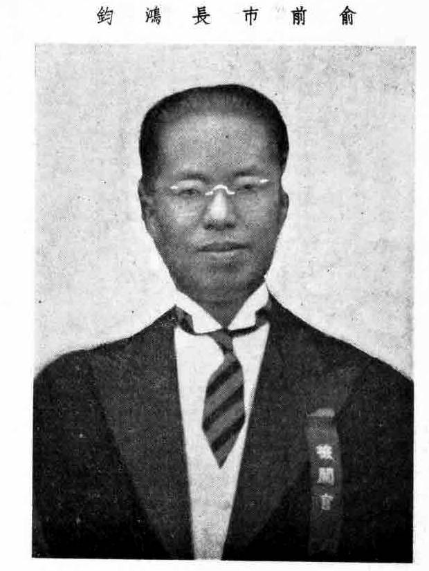 上海市公訓同學紀念